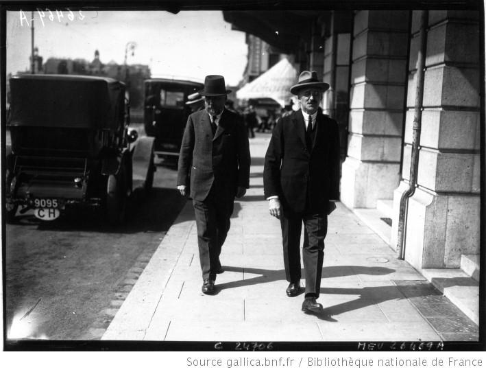 Ionel Bratianu, izquierda y el embajador rumano Ion Duca en Ginebra para asistir a una sesión de la Sociedad de Naciones, 1925.